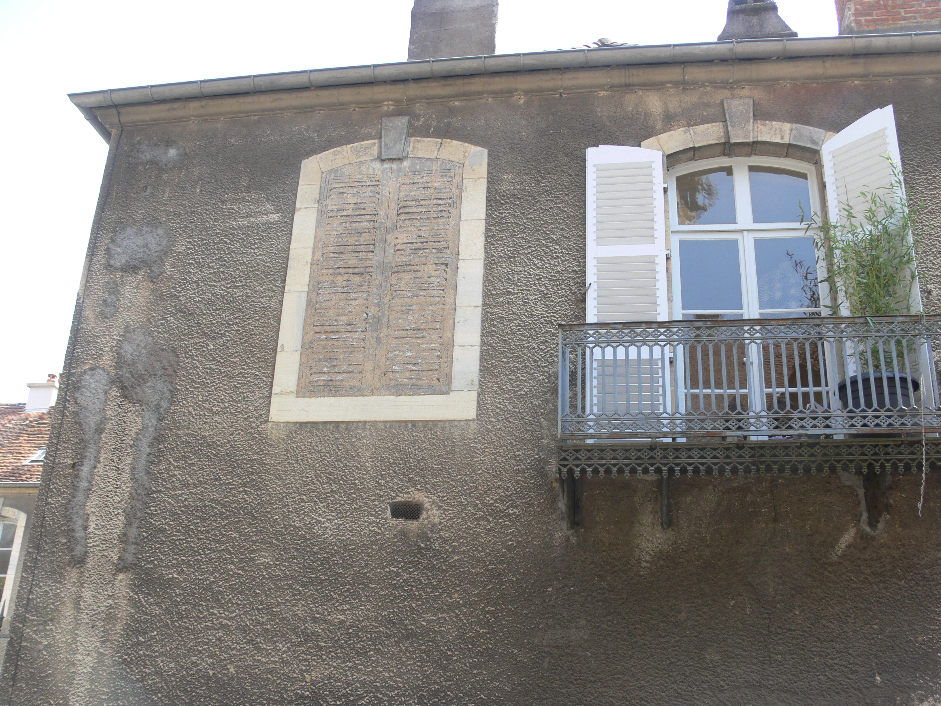 hôtel Lyautey de Genevreuille (Haute-Saône, France). Vers 1760